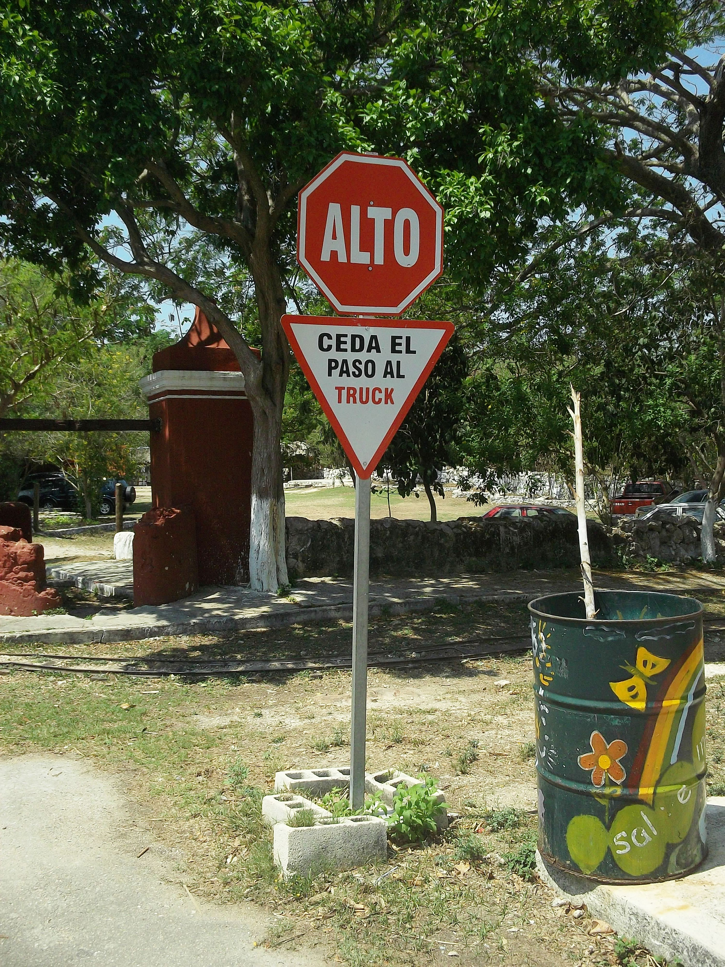 Hacienda de Dzoyaxché (Mérida), Yucatán.